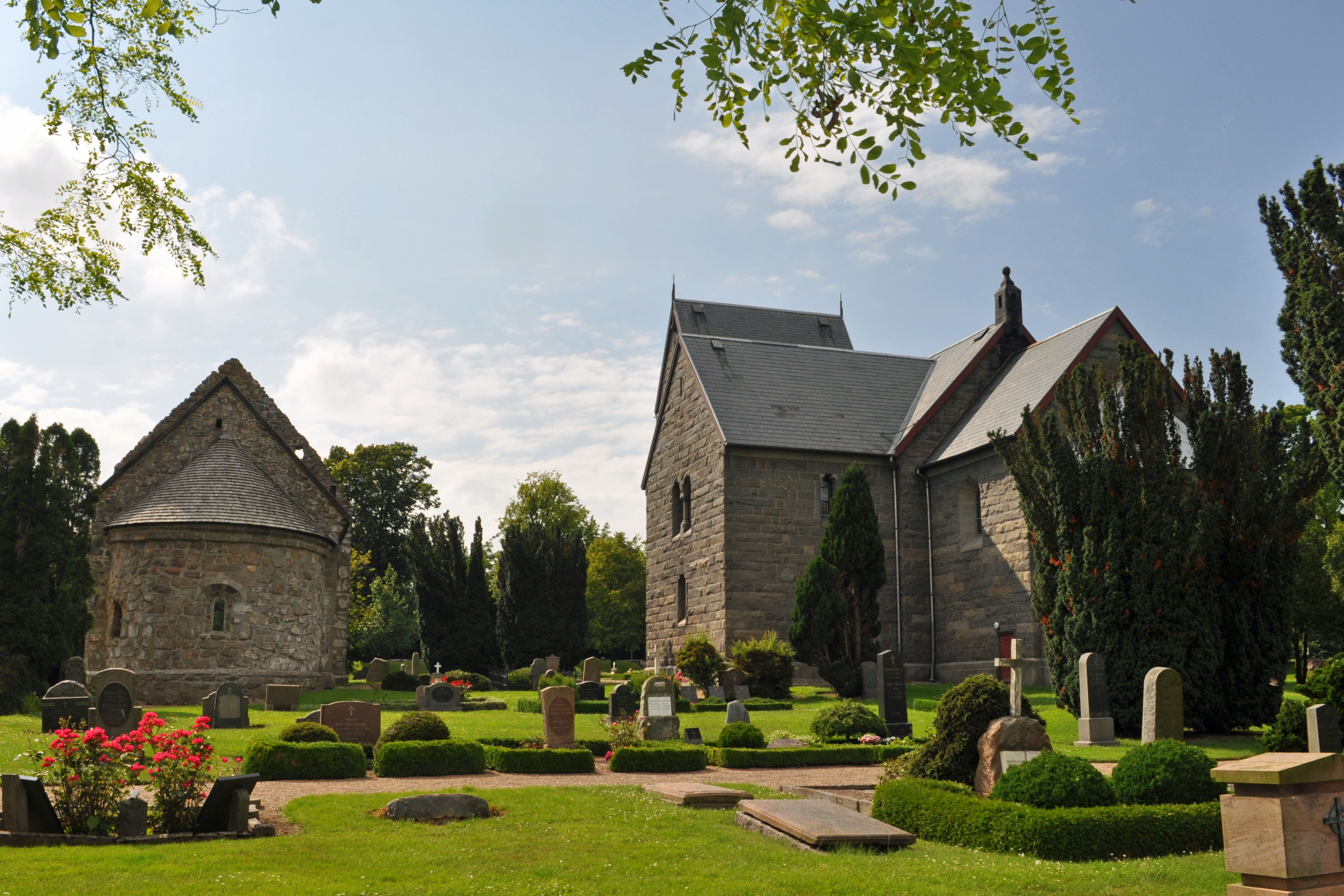 Østermarie Kirche, Bornholm (2012-07-11), by Klugschnacker in Wikipedia (27)